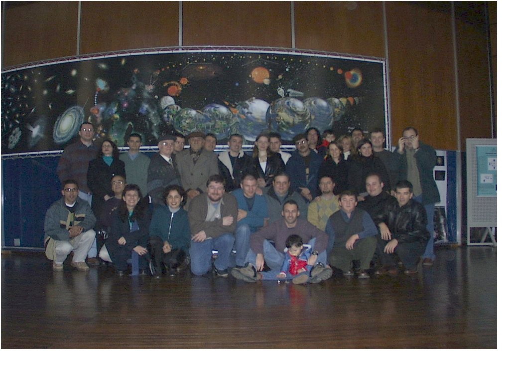 Refundação da Sociedade Astronômica Riograndense (SARG), de Porto Alegre, RS, Brasil, em 16 de agosto de 2003, preparando-se para celebrar seus 25 anos de existência.